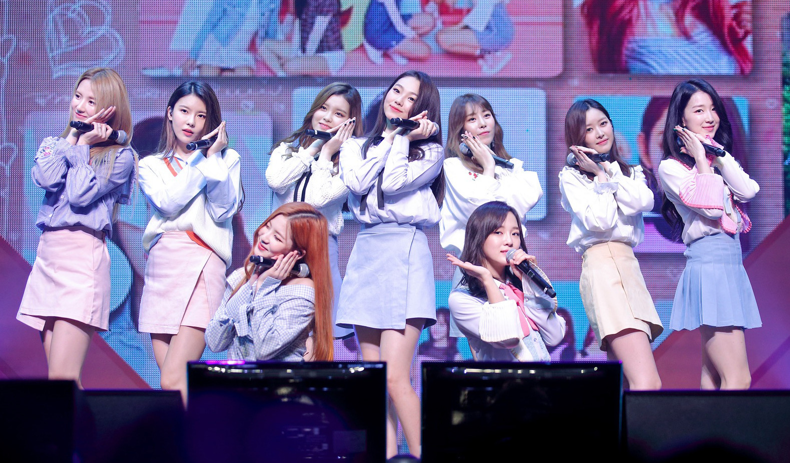 한국어 (조선): 170909 구구단 구구데이 팬미팅